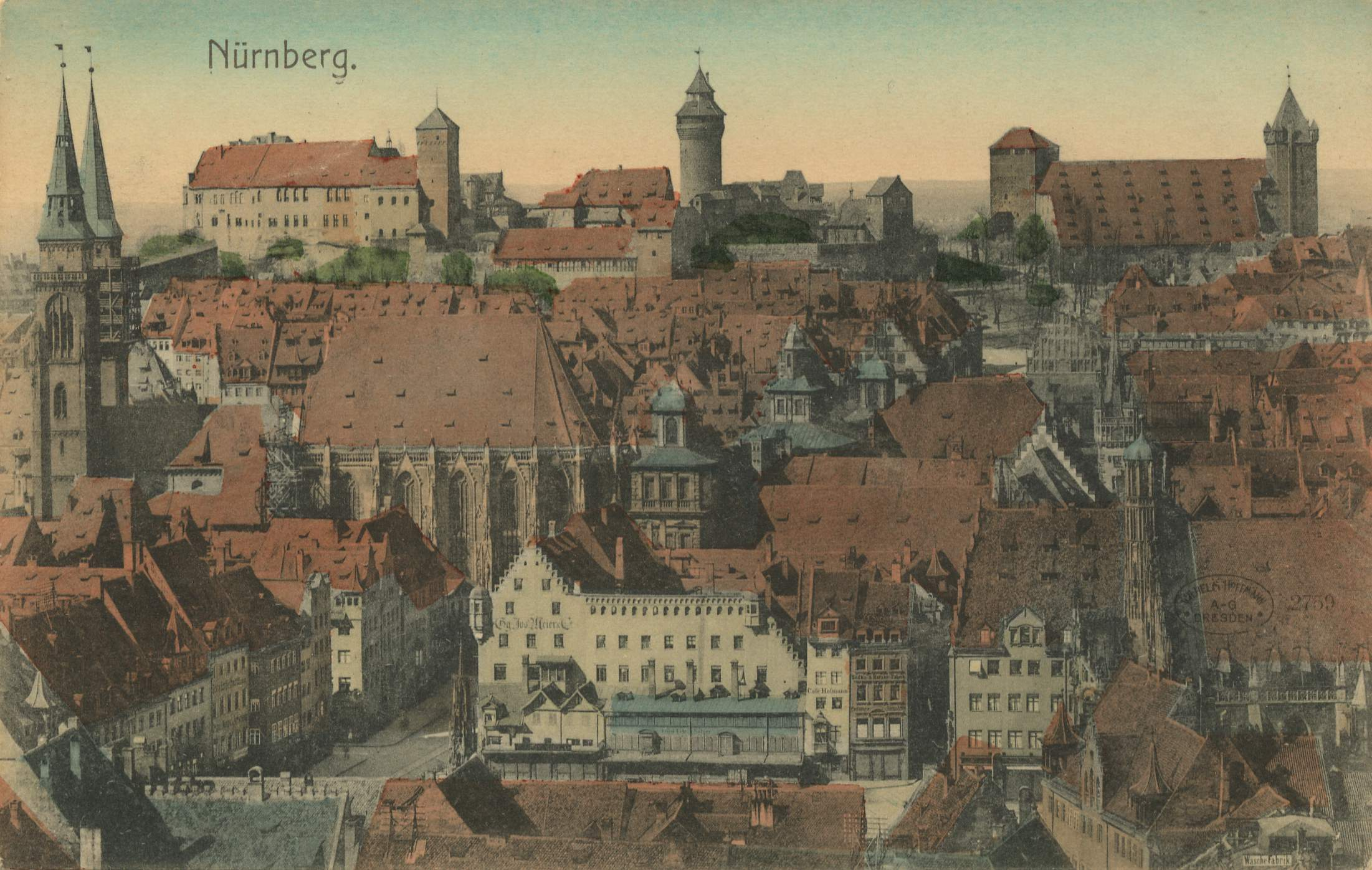 Nürnberg